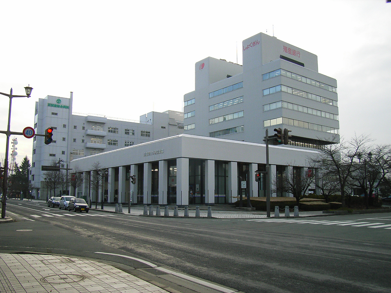 Shokusan Bank. Yamagata, Yamagata prefecture, Japan.